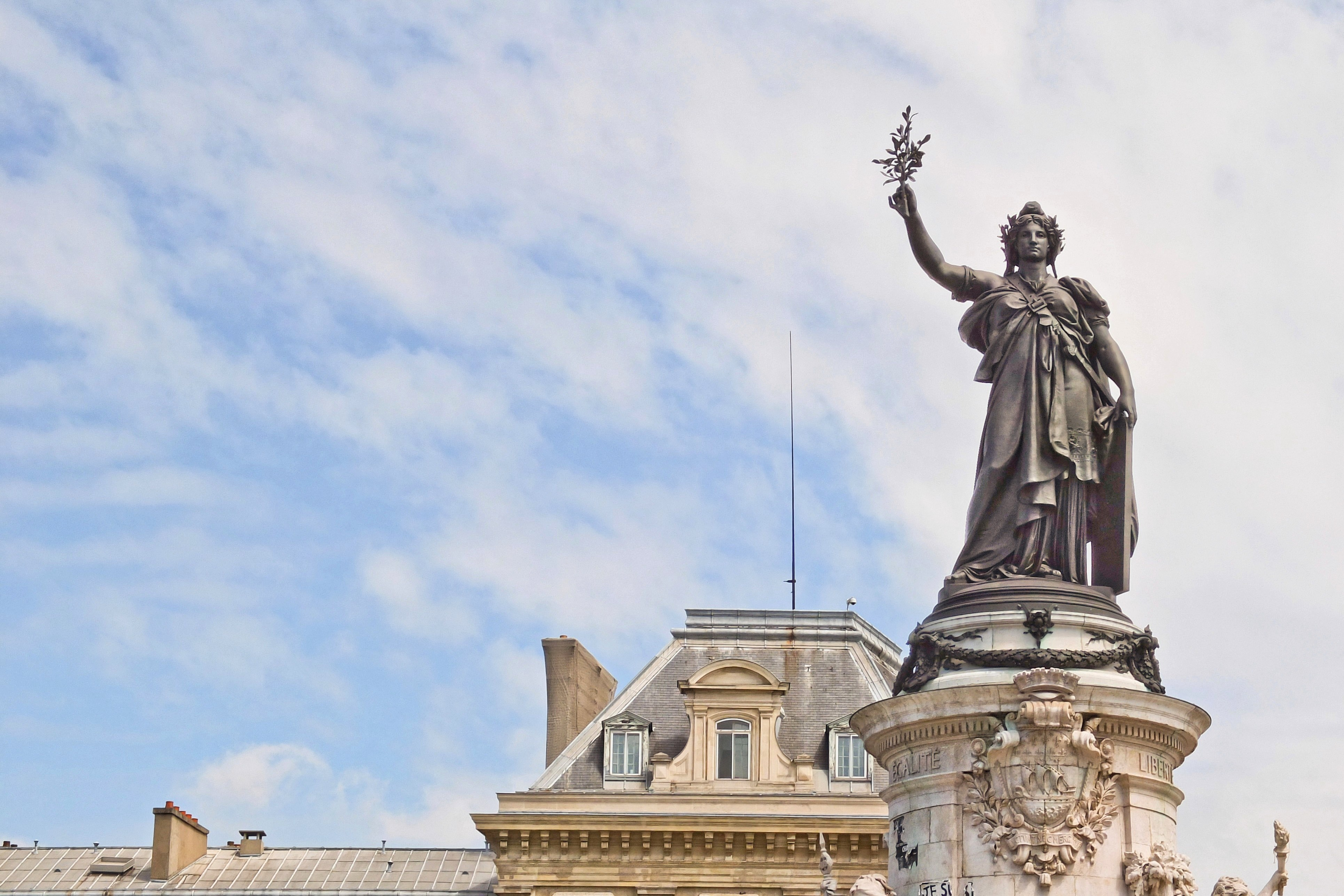 Monument à la République, Place de la République, Paris, France.